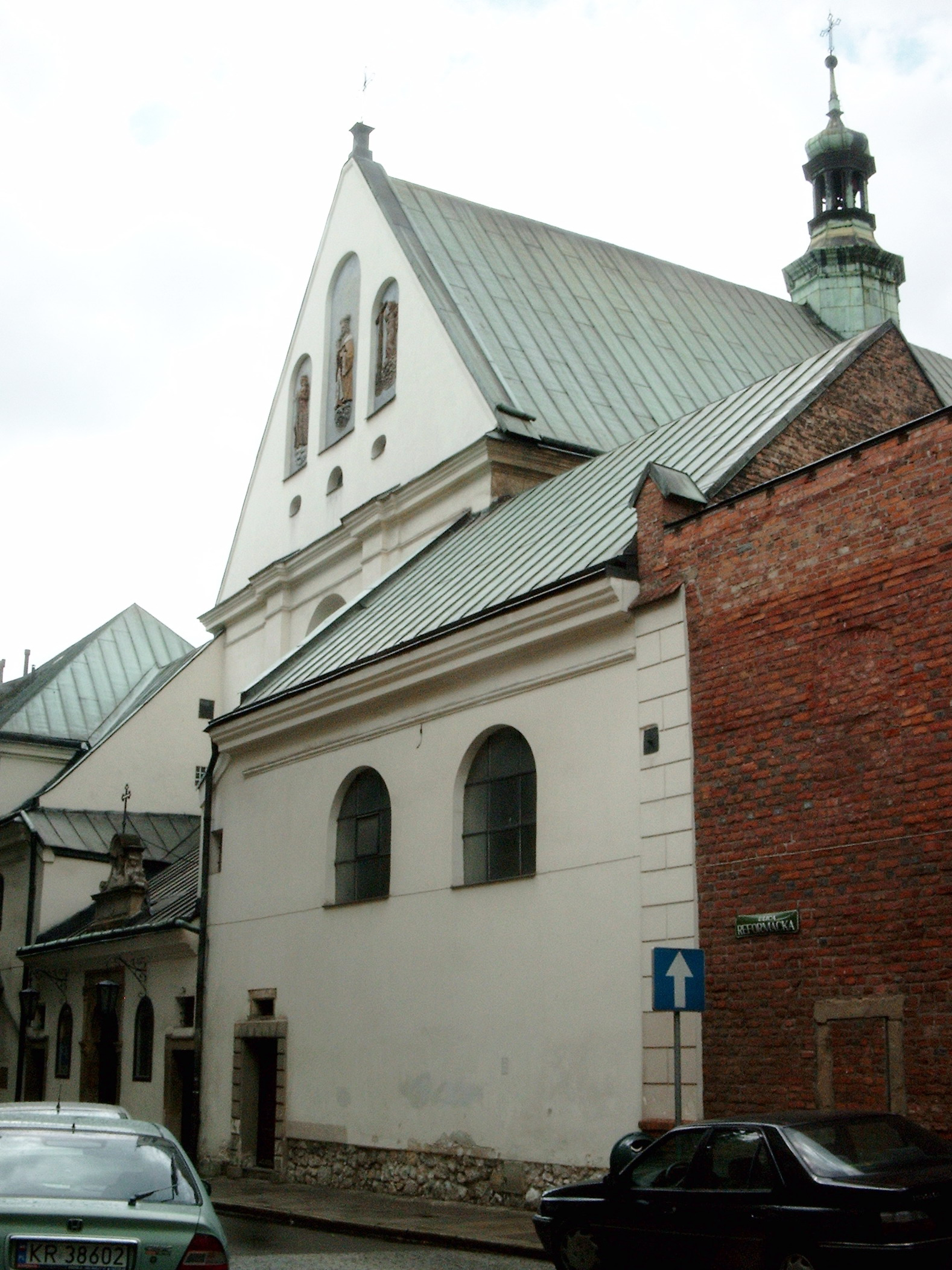 Kościół Reformatów pw. św. Kazimierza Królewicza w Krakowie